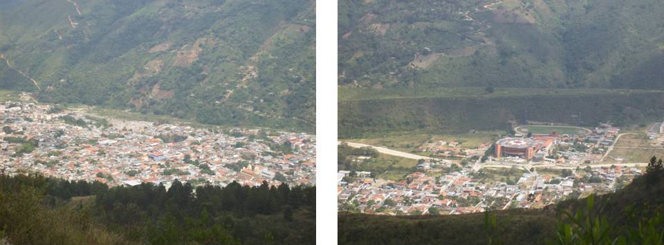 Tovar desde el paramo de Mariño